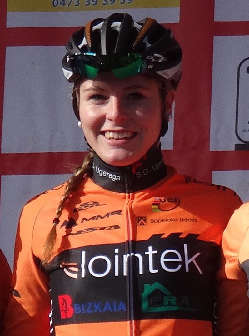 La ciclista Soline Lamboley